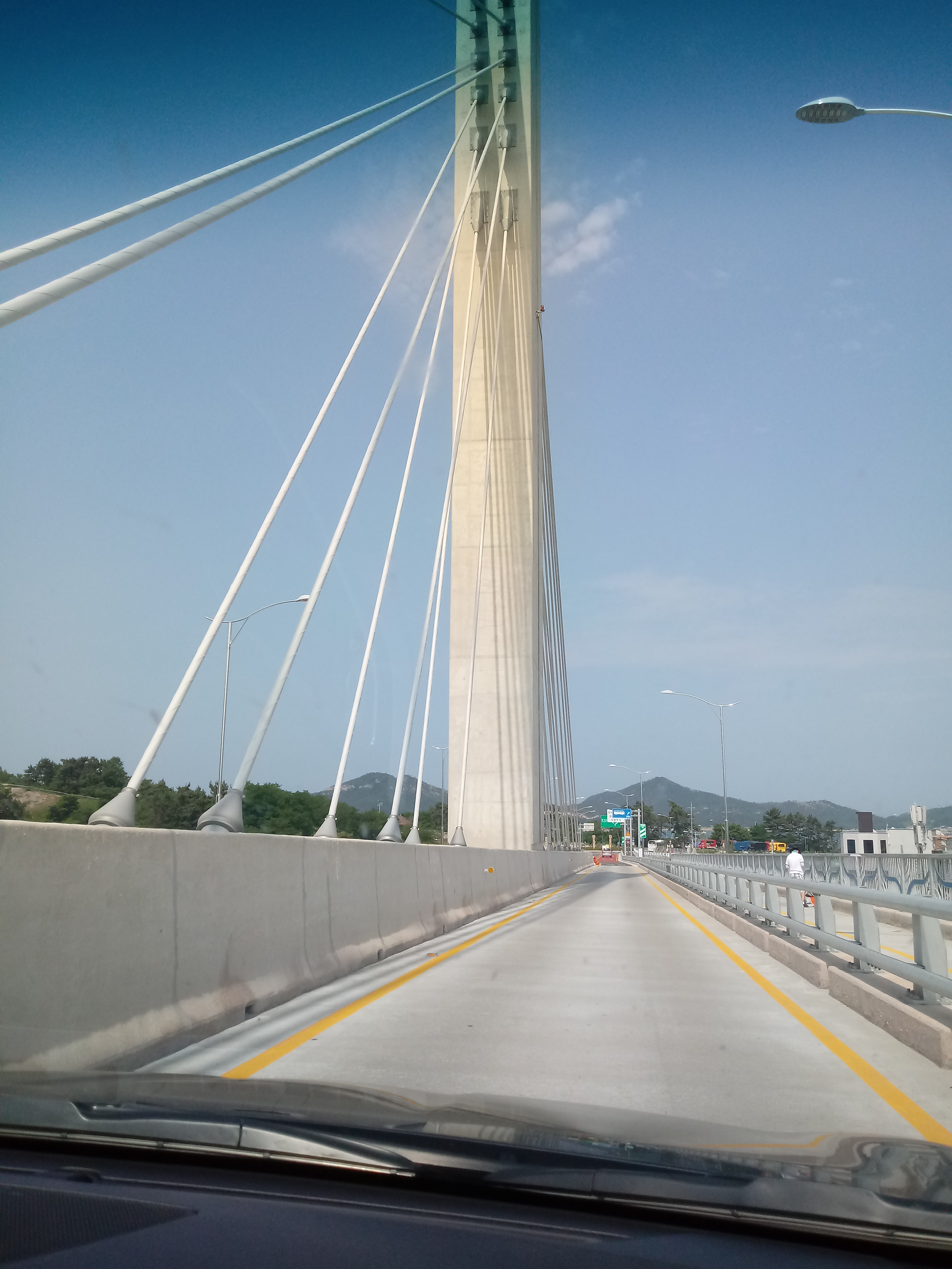 전북 군산시에 있는 장자교